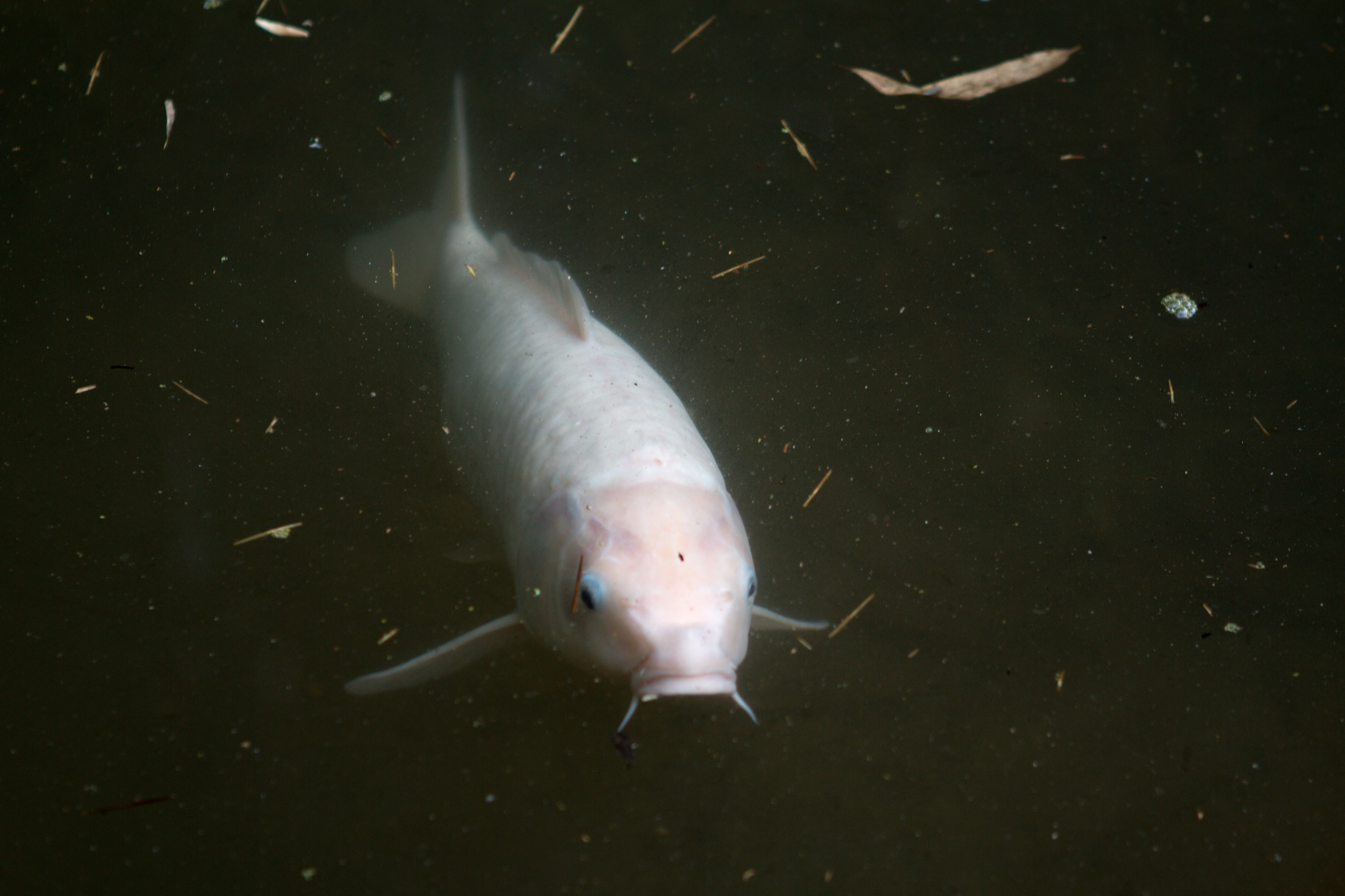 Bambouseraie de Prafrance (Gard, France).